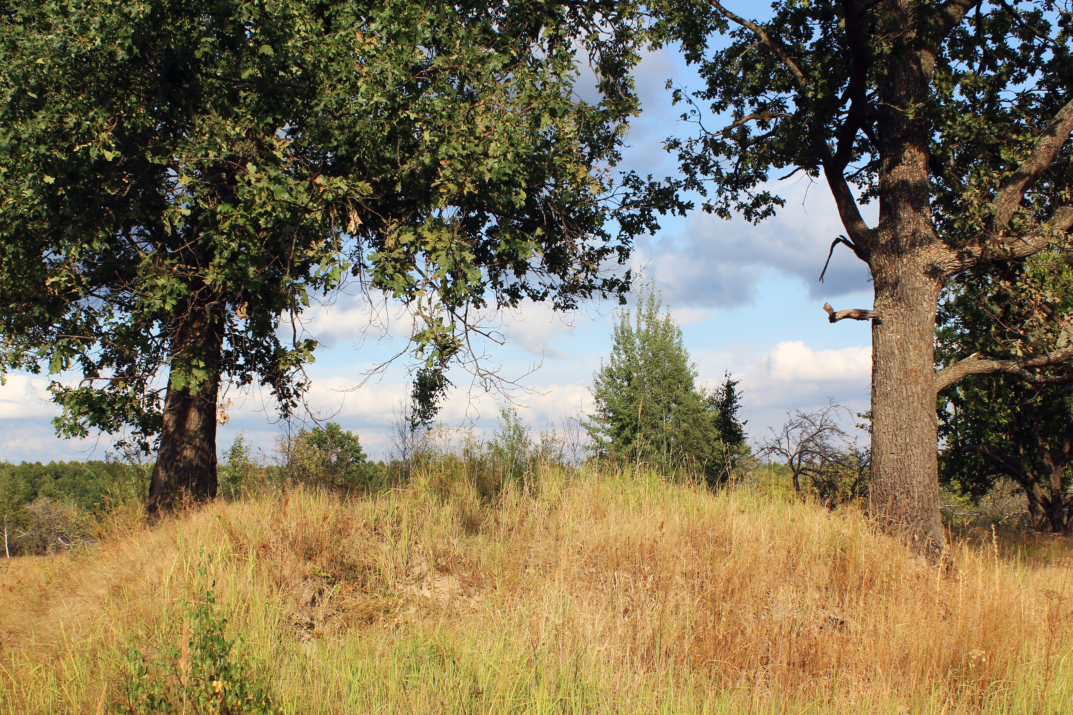 Курган: Гулёвка, Клинцовский район, Брянская область